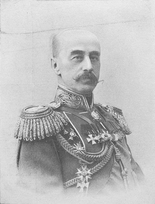 Пантелеев Александр Ильич